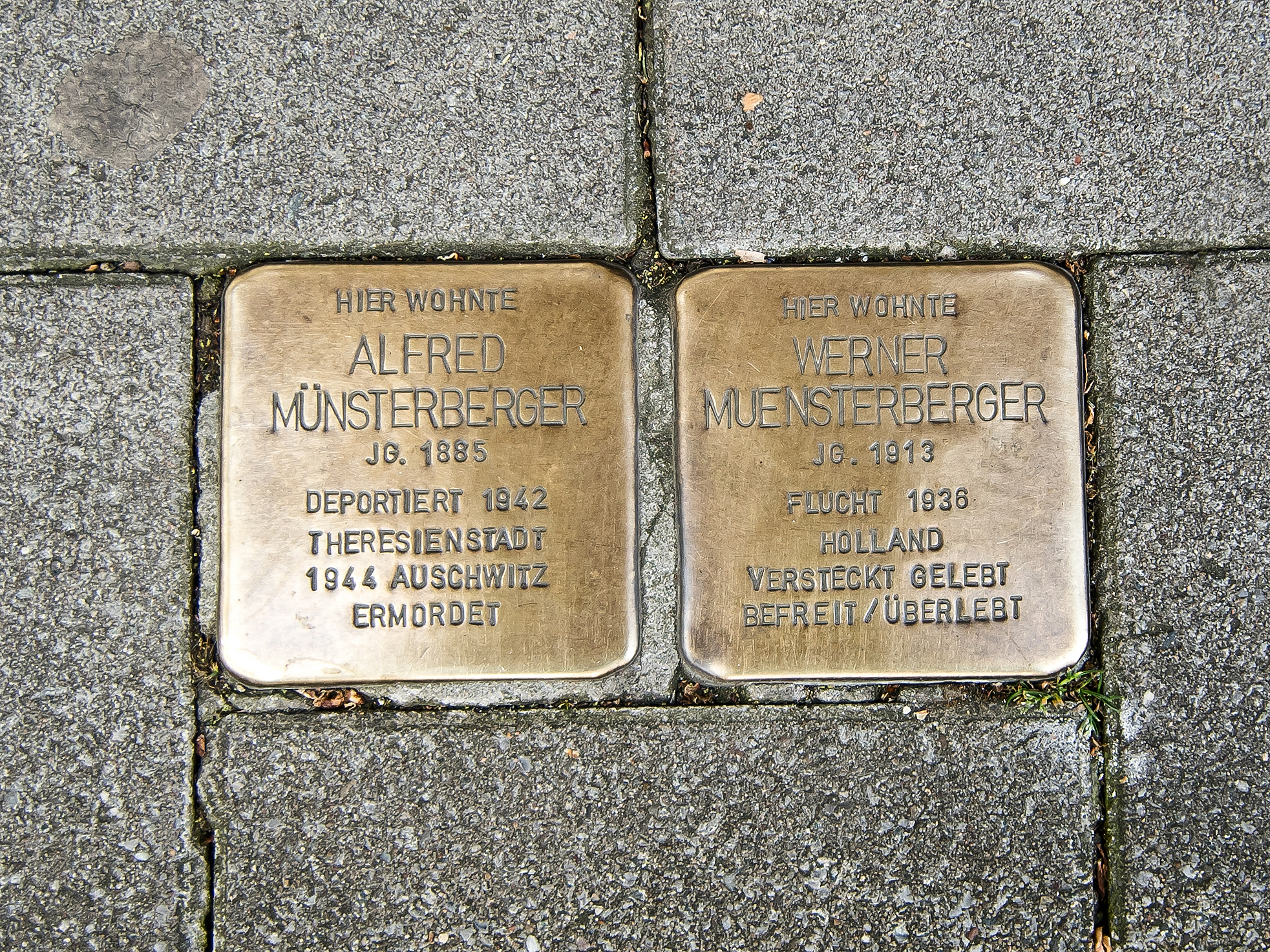 Stolpersteine Alfred und Werner Muensterberger in Dortmund